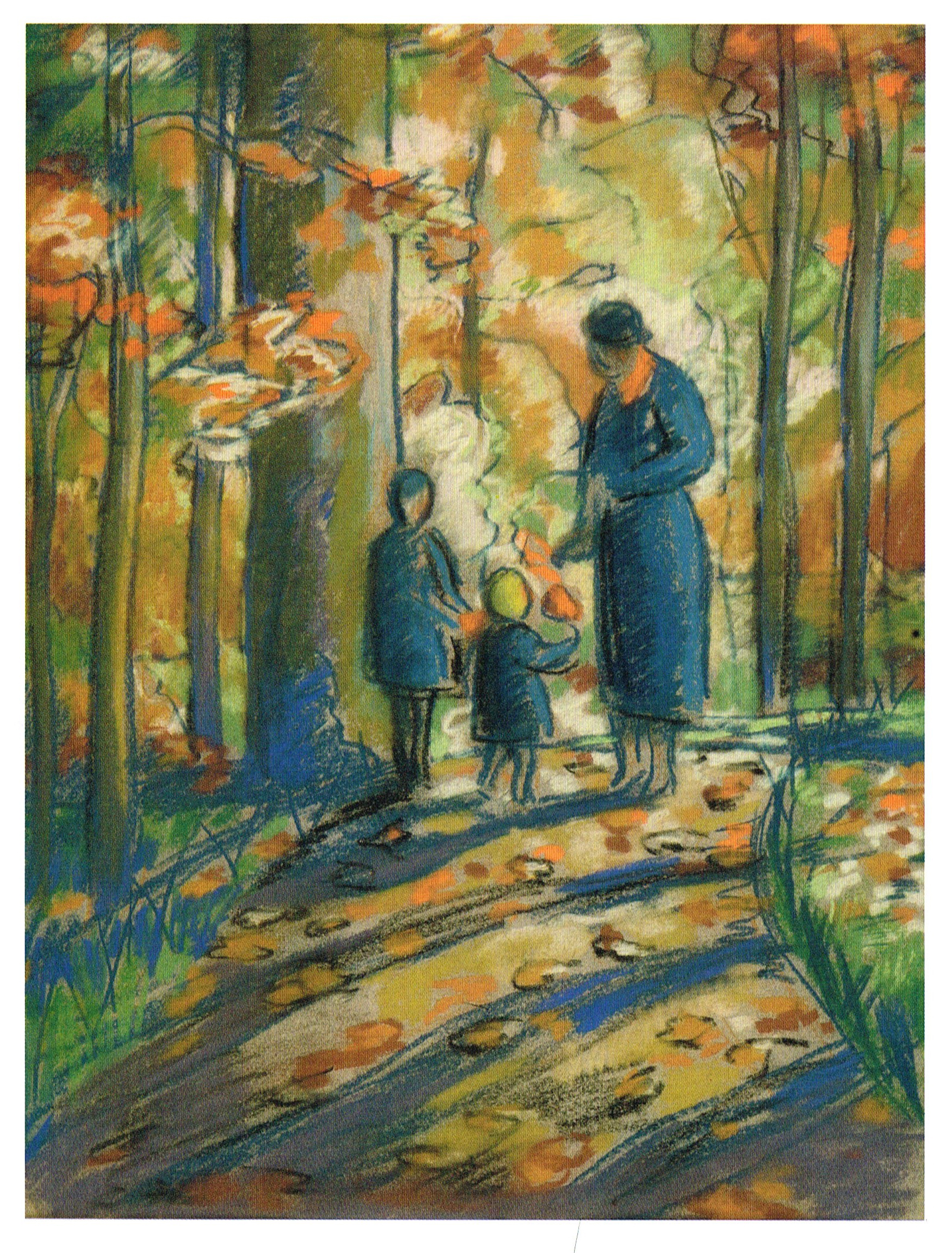 Автор Владимир Владимирович Кудряшев (25 июля 1902, Малые Яльчики Казанской губернии, Российская империя – 09 ноября 1944, Москва). График, скульптор, живописец